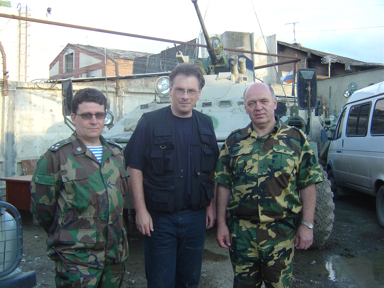 Лушников